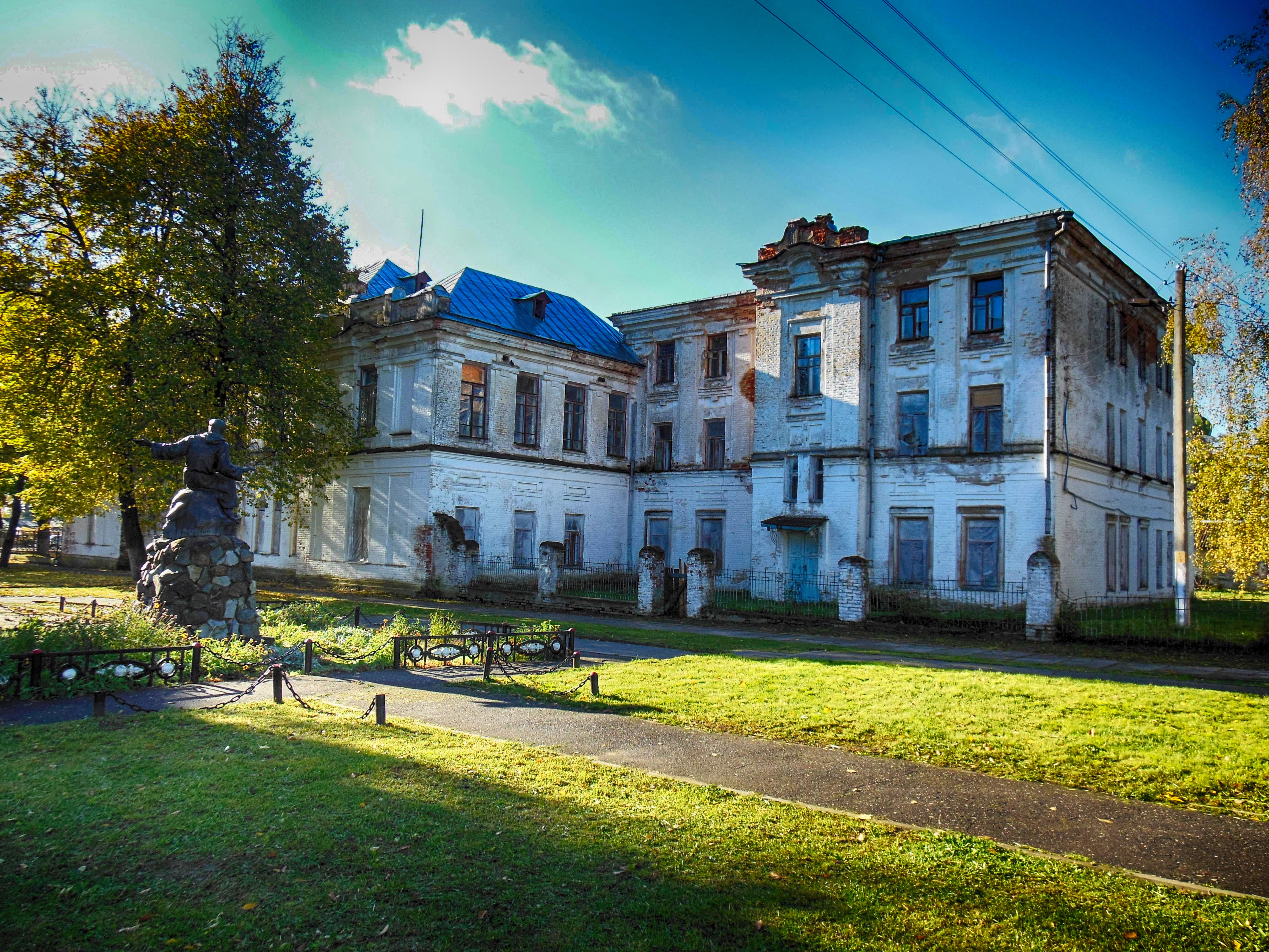 Беларуская (тарашкевіца): Мсьціслаў, мужчынская гімназія